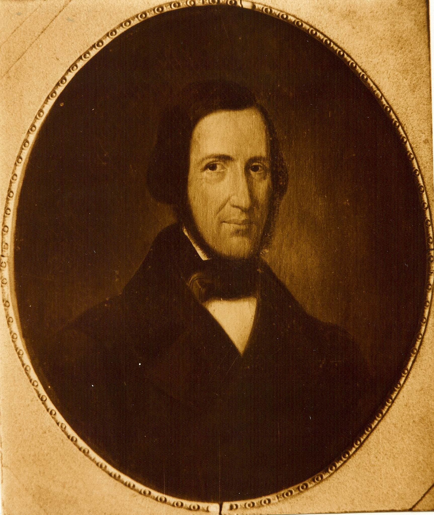 Fotografía de Pintura familiar del S. XVIII.